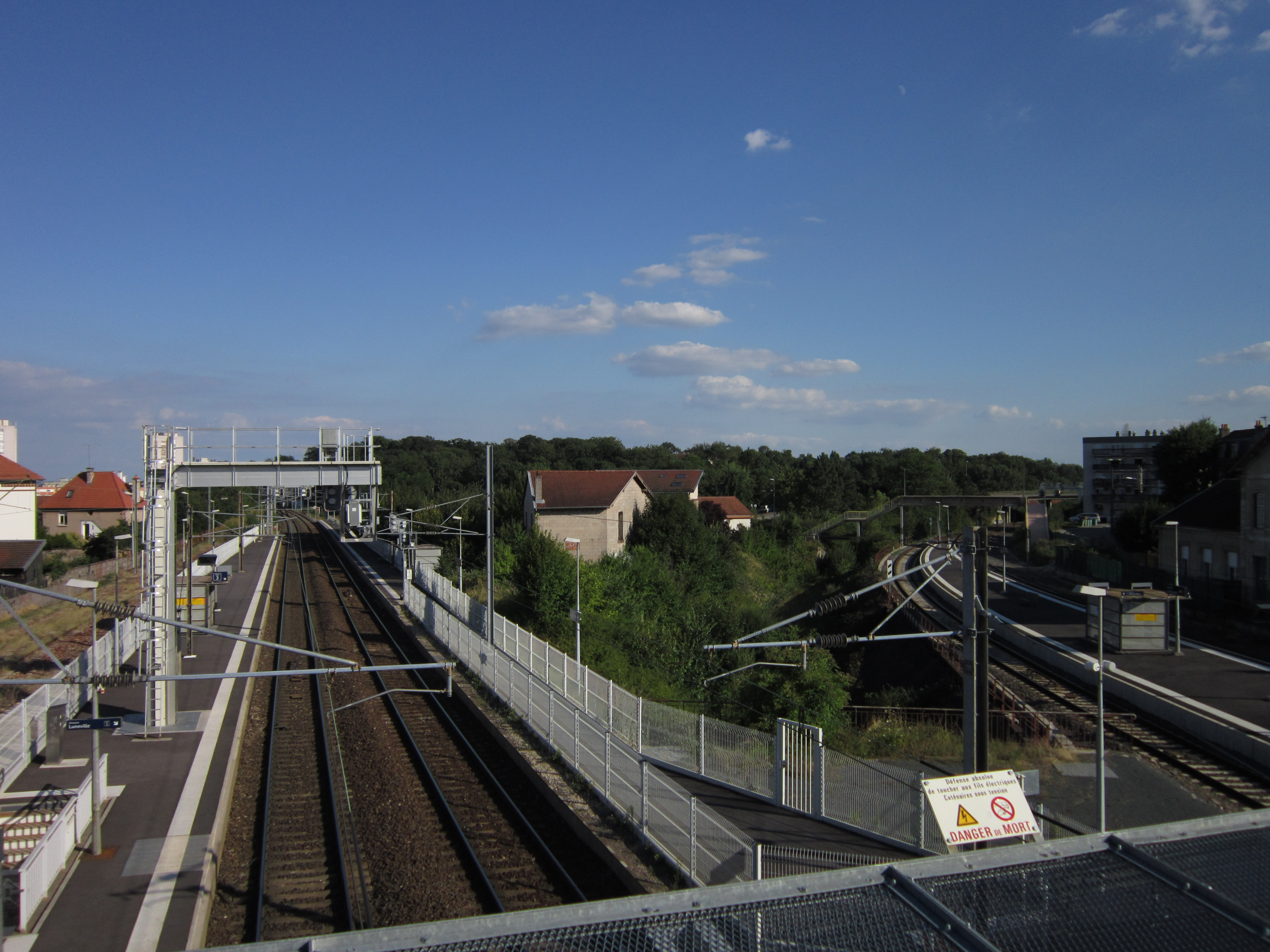 Bifurcation des voies en gare de Jarville-la-Malgrange en direction d'Epinal et de Strasbourg.